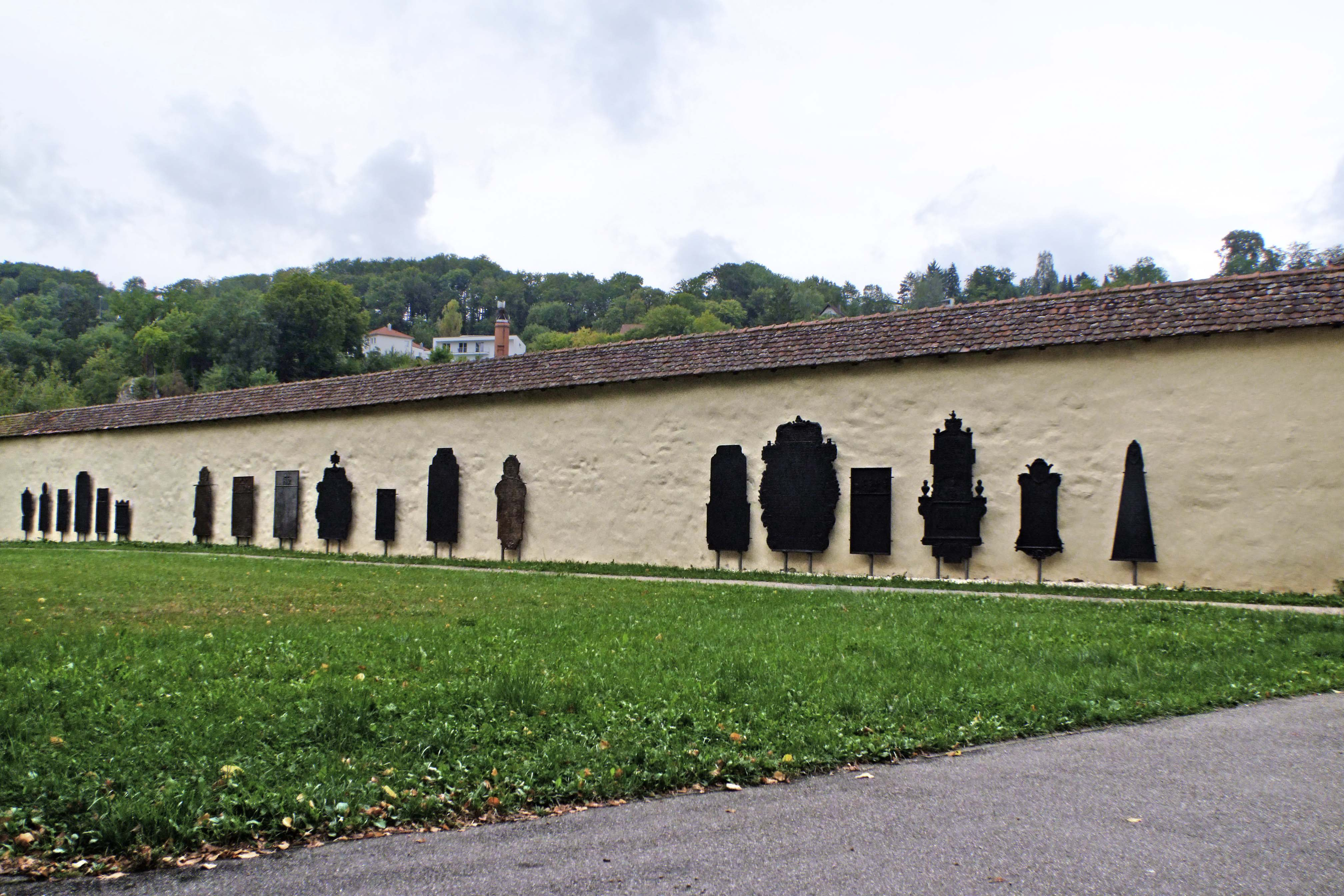 Epitaphe sind Gedenktafeln an Verstorbene. Königsbronn hat die größte Sammlung von gusseisernen Epitaphen in Deutschland. Einige waren ehemals farbig emailliert. An der Klostermauer (Bild) sind 19, weitere 9 sind an und in der nahen Klosterkirche angebracht. Die Herstellung erfolgte im offenen Herdguss, die Rückseiten der Tafeln sind also rau und uneben. Die Epitaphe entstanden zwischen 1697 und 1806 (Sterbejahr der beschriebenen Person).